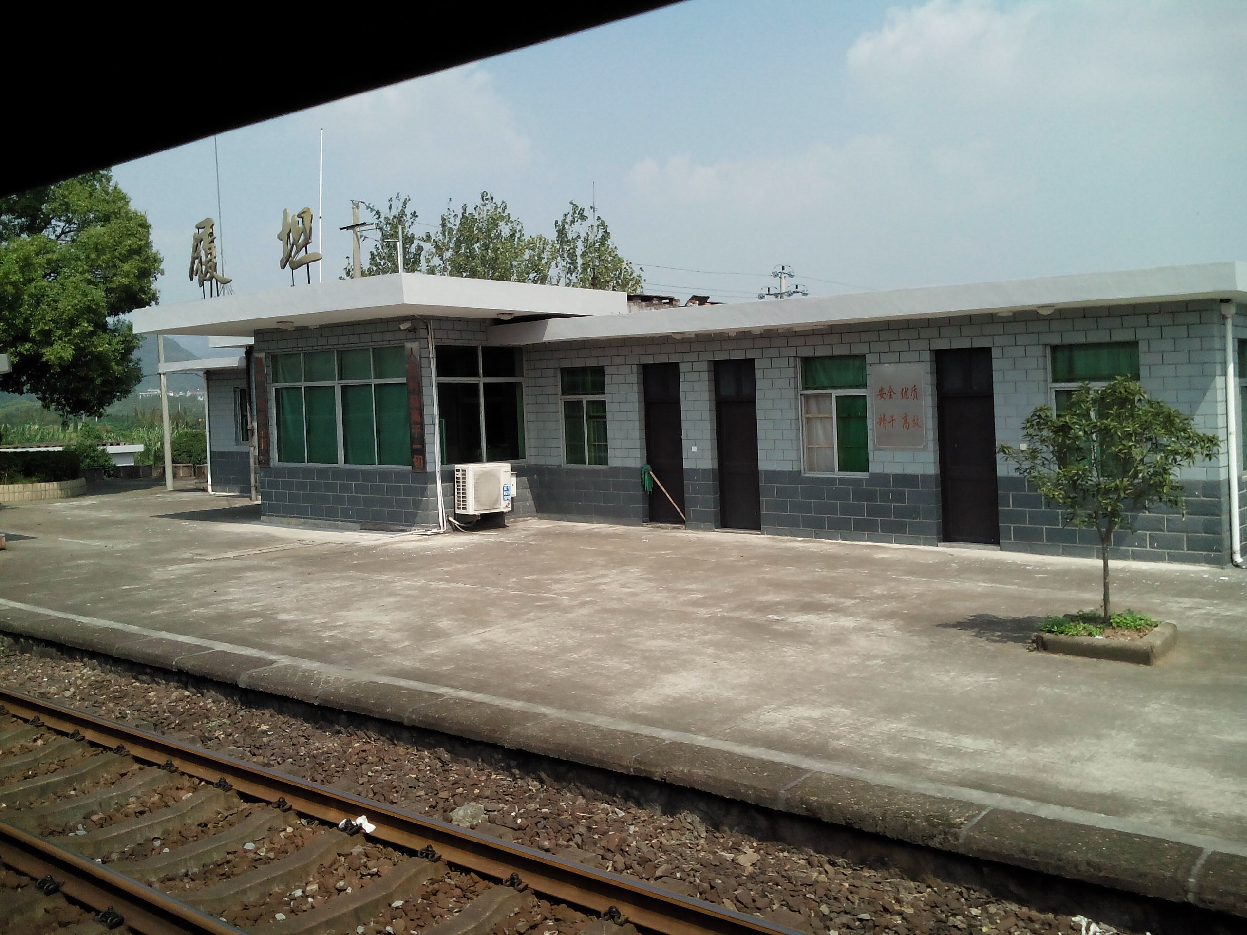 201410履坦站站房